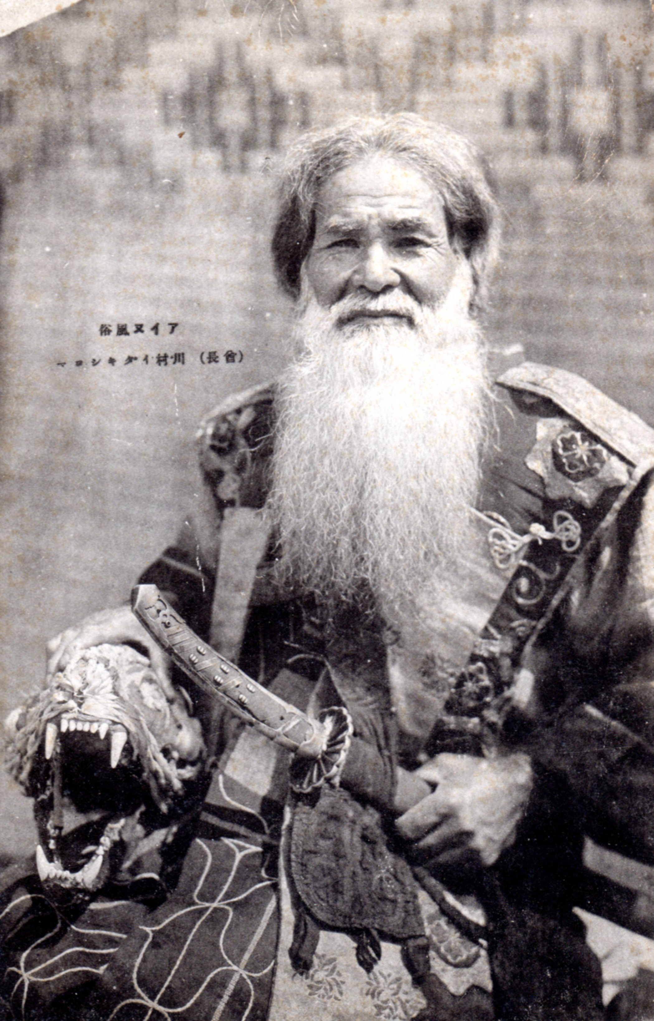 昭和12年頃の絵葉書による川村イタキシロマの肖像。